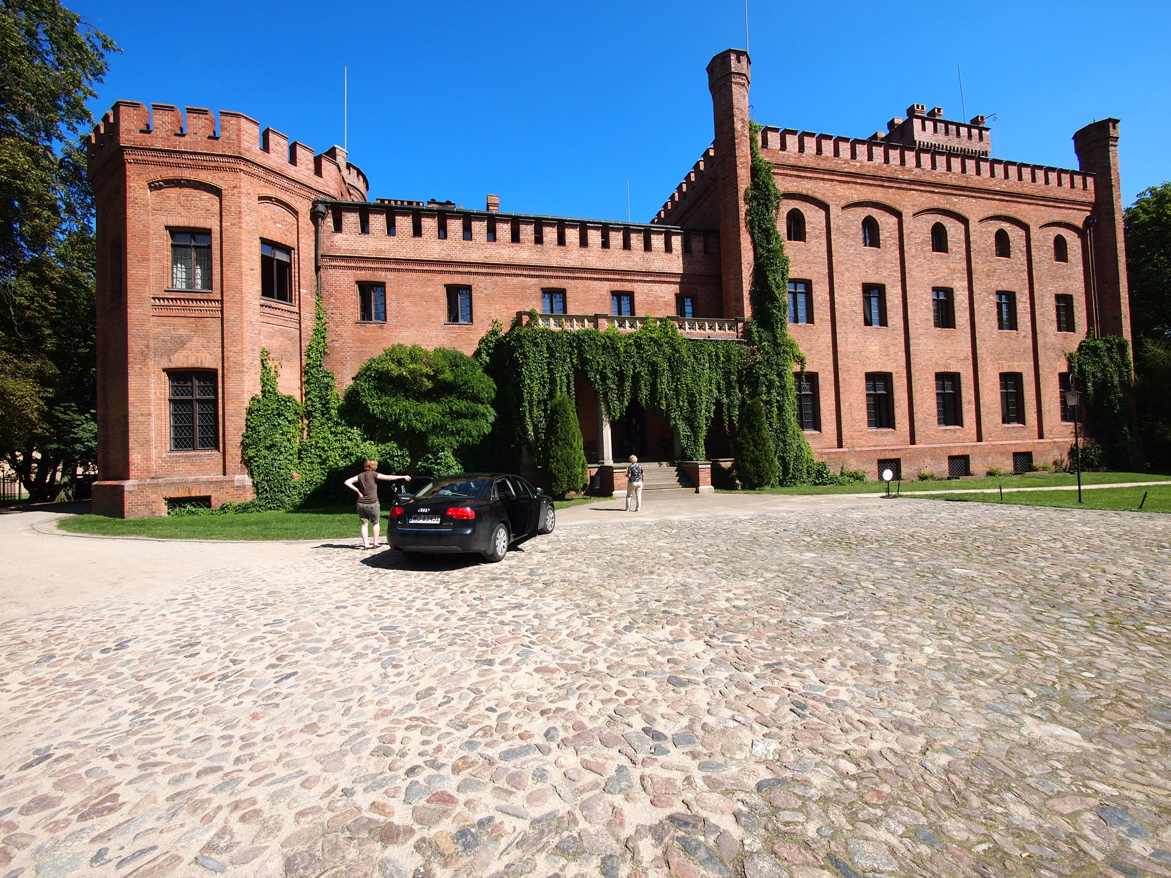 Rzucewo - pałac, 1840-1845